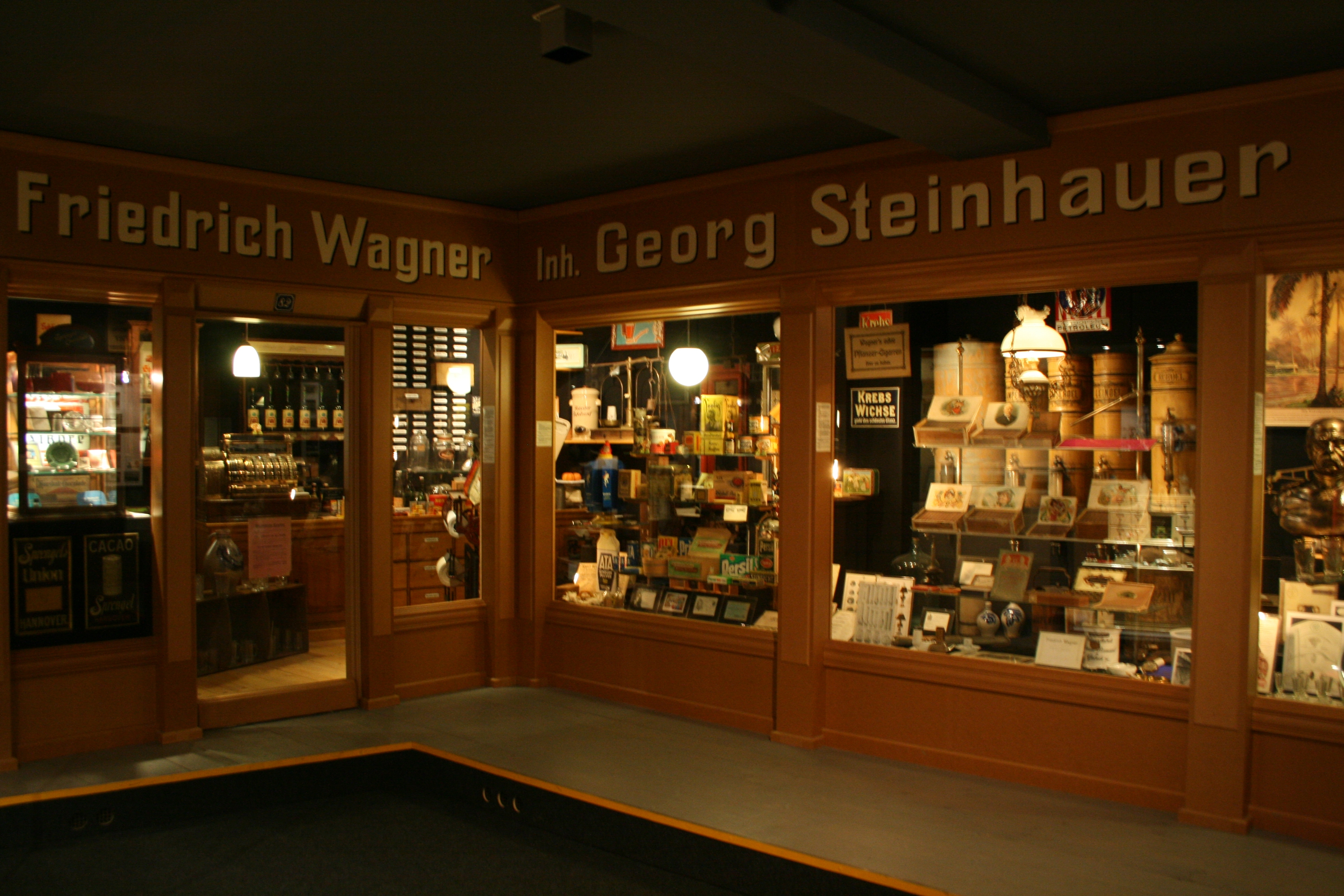 Kolonialwarenladen um die Wende vom 19. zum 20. Jahrhundert im Wetterau-Museum in Friedberg. Mit freundlicher Genehmigung des Museums.